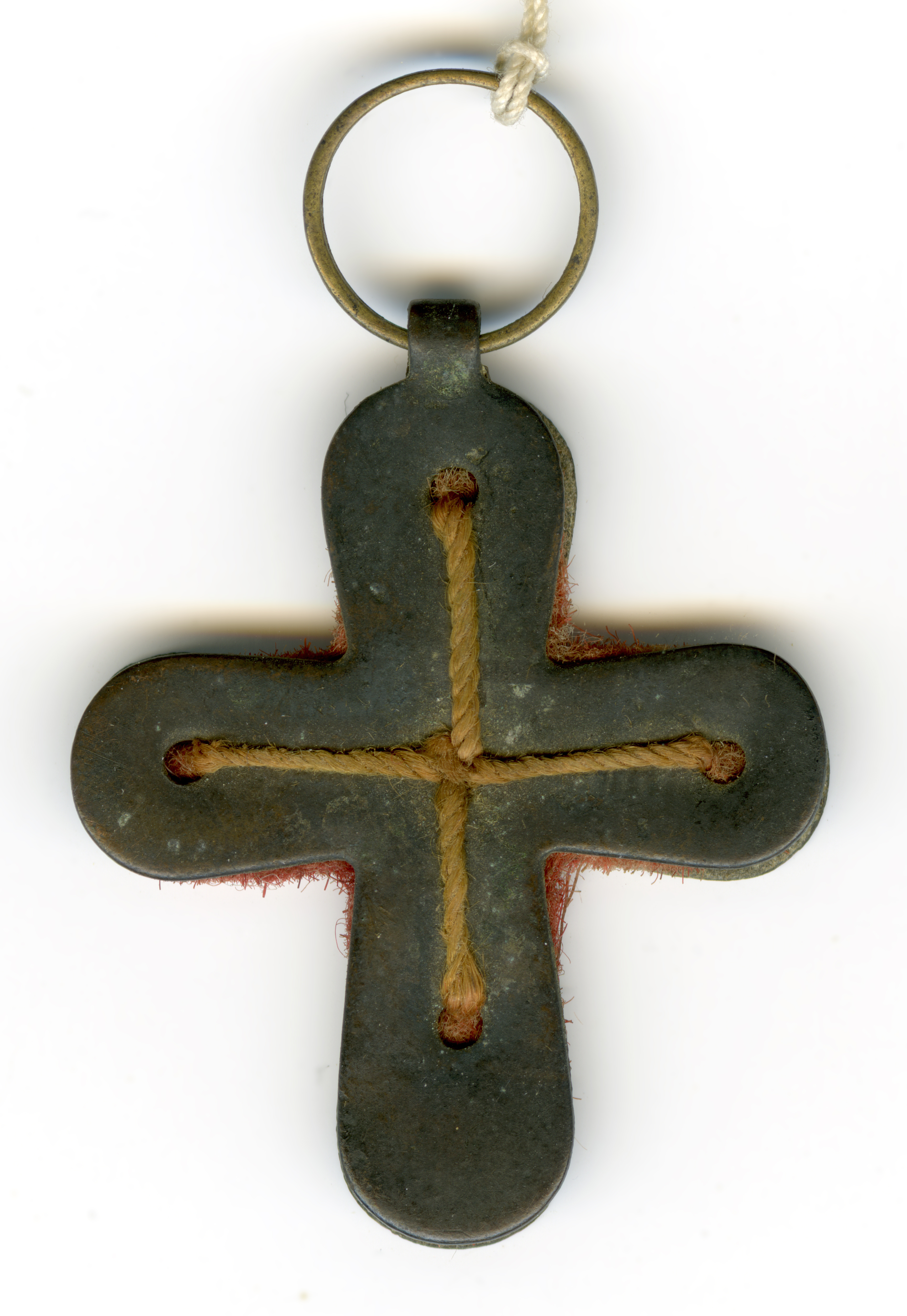 Voltakors är en alternativmedicinsk produkt som var populär på 1890-talet. Voltakorset består av en kopparplatta och en zinkplatta med ett fuktigt tygstycke emellan. De elektriska strömmar detta alstrade troddes vara nyttiga. Införskaffades till Falköpings museum i Falköping 1942 och har där inventarienummer 2M16-A7578.